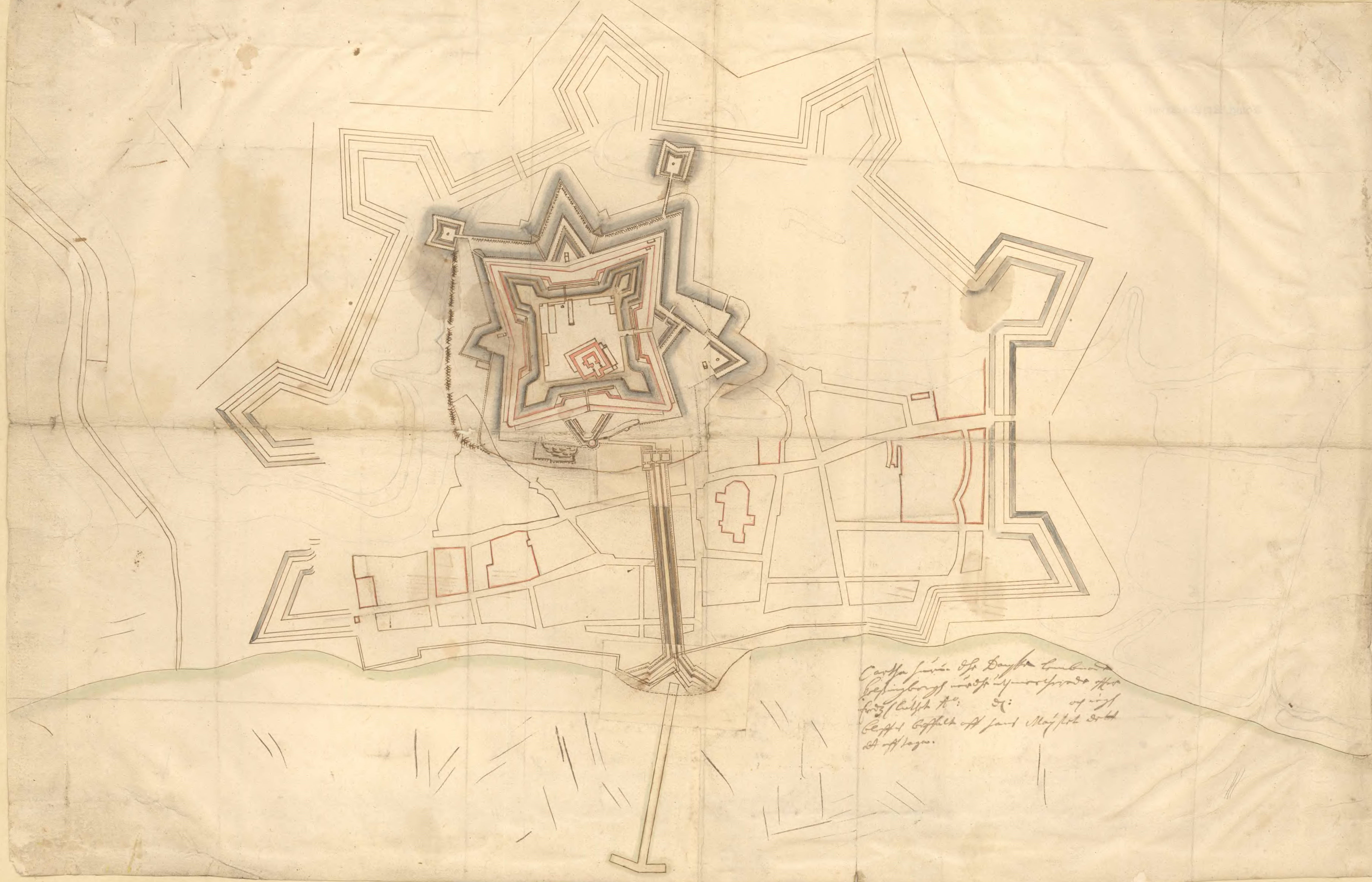 Helsingborg 1679 efter den danska ockupationen under Skånska kriget.